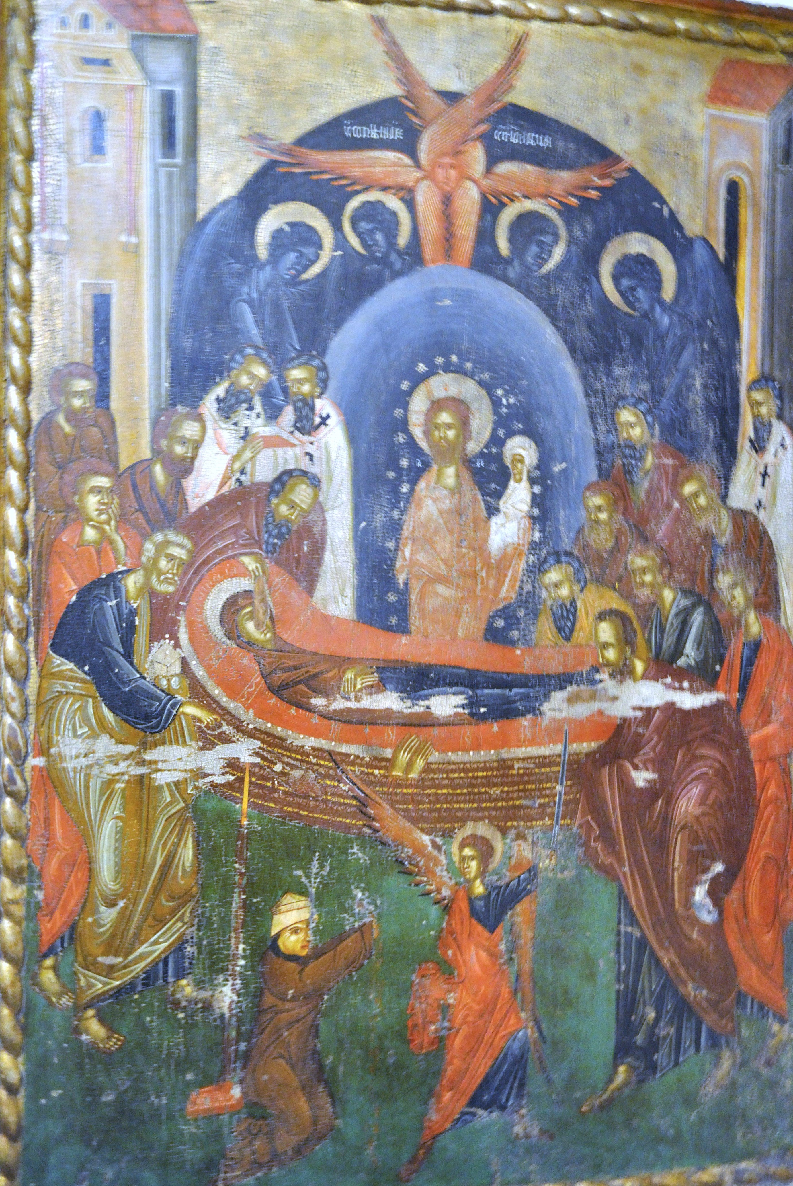 Biserica de lemn „Sfinții Arhangheli” din Păniceni, județul Cluj